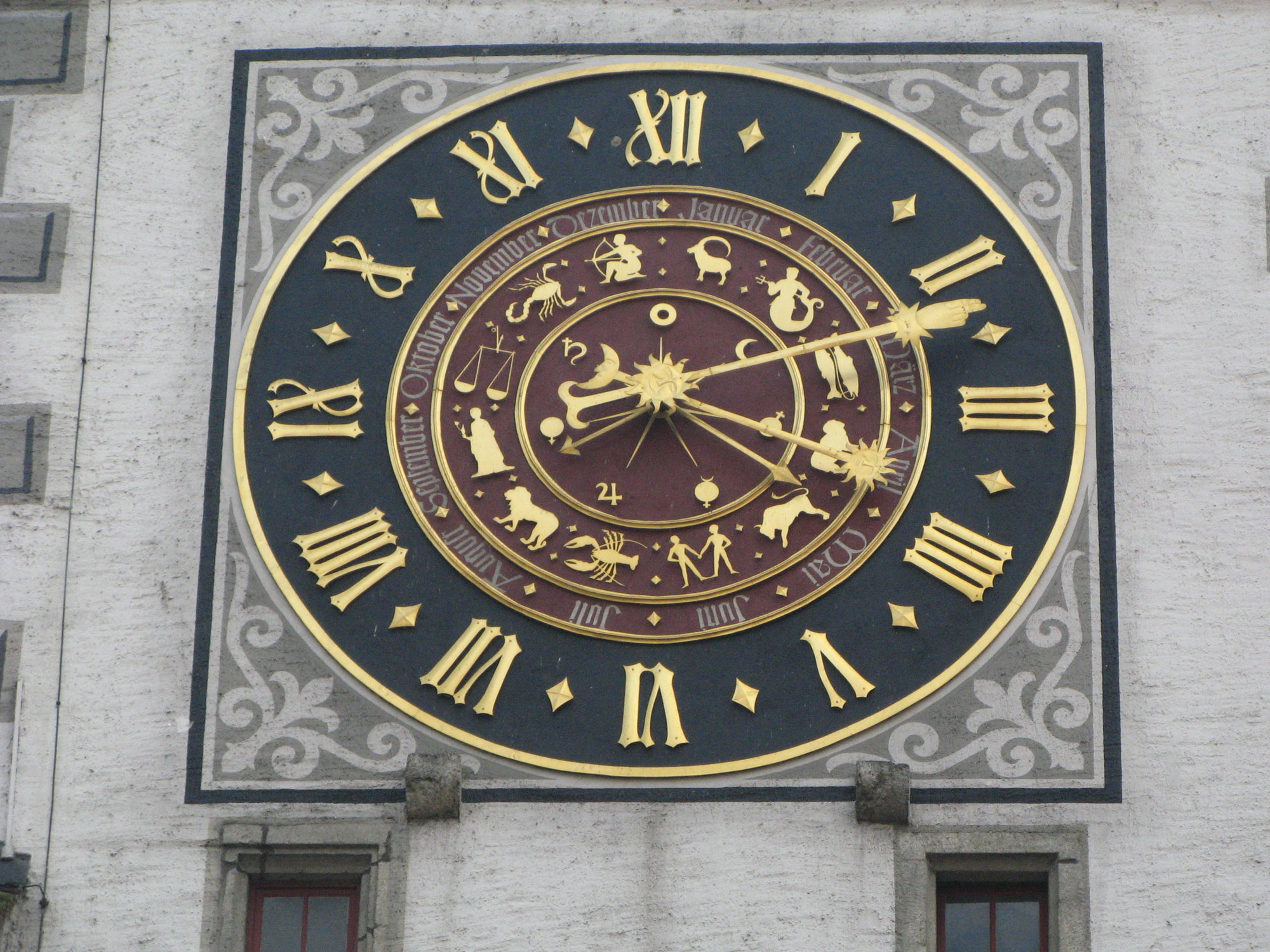 Zifferblatt des Zeitturms in Mellingen